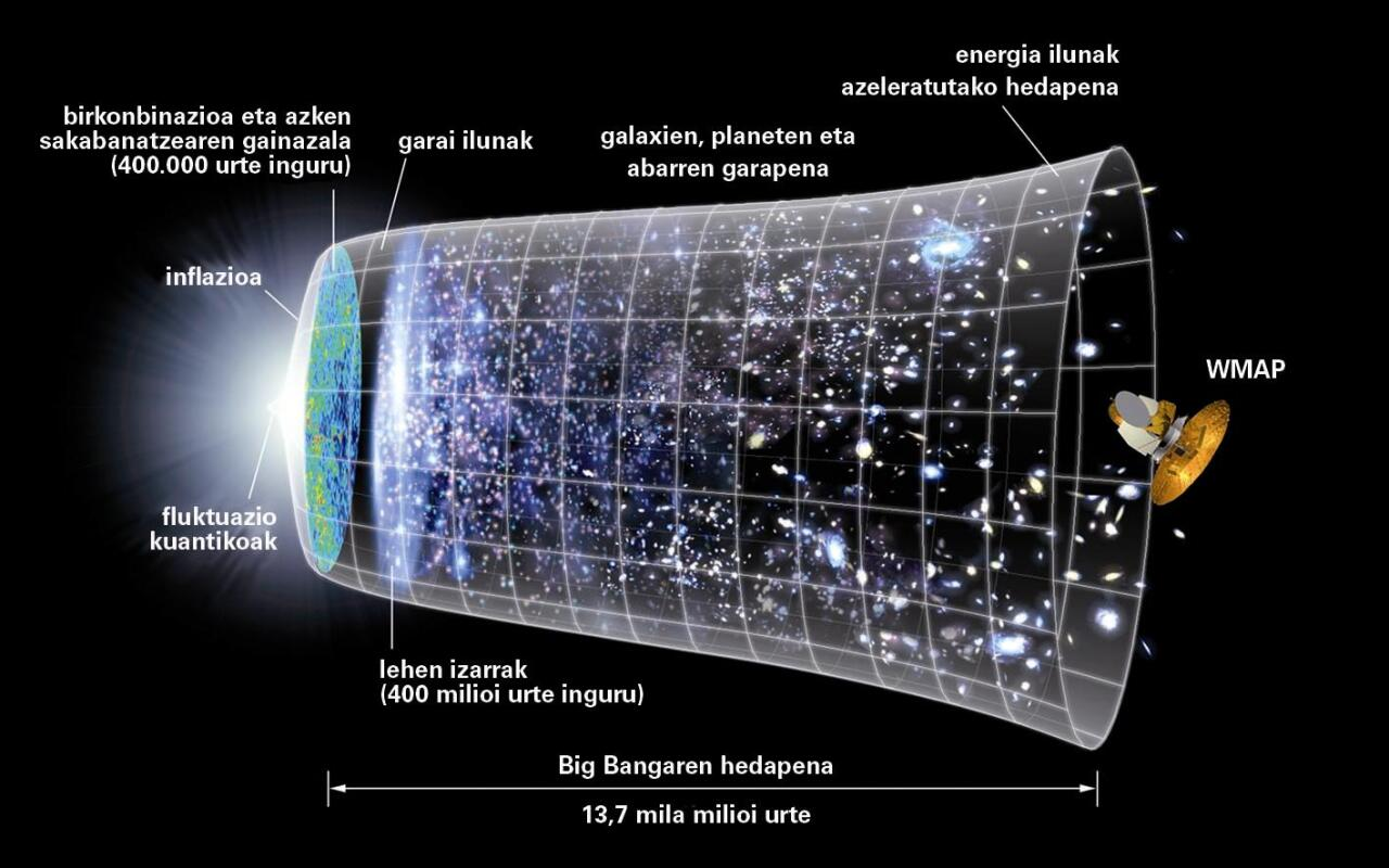 Unibertsoaren eboluzioaren irudikapena: Big Banga eta ondorengo hedapena. Eboluzioa irudikatzeko, bi dimentsio espazial (irudiaren sekzioa) eta denbora-dimentsio bat erabili dira